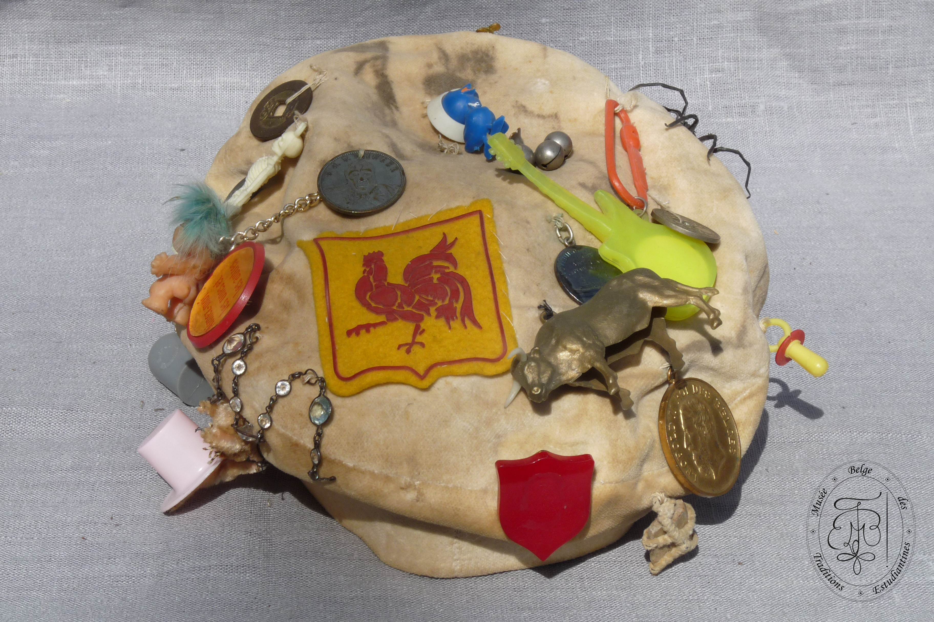 Penne d'étudiant en Philologie de l'université de Liège (portée par le professeur Robert Halleux dès 1964) Vue arrière Collection : Musée Belge des Traditions Estudiantines Don : Robert Halleux